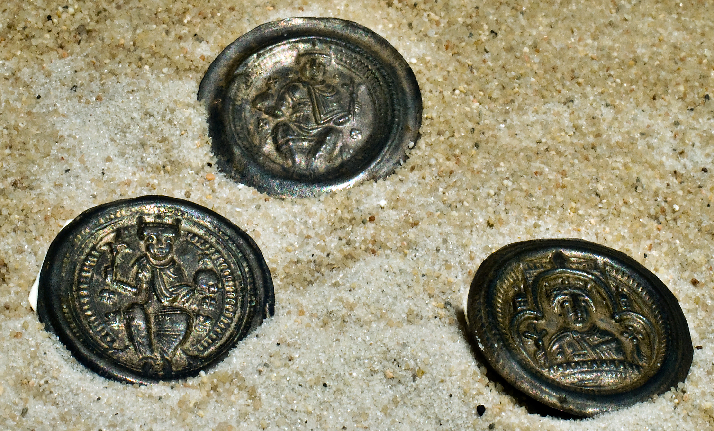 Historisches Museum Frankfurt am Main Silberne Brakteaten aus dem 12. Jahrhundert